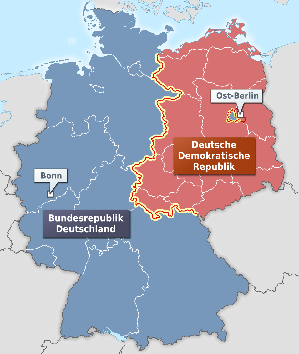 Karte der Innerdeutschen Grenze mit DDR und BRD (und Berlin). Zusätzlich sind die Grenzen der Bundesländer der BRD und Bezirke der DDR eingezeichnet.